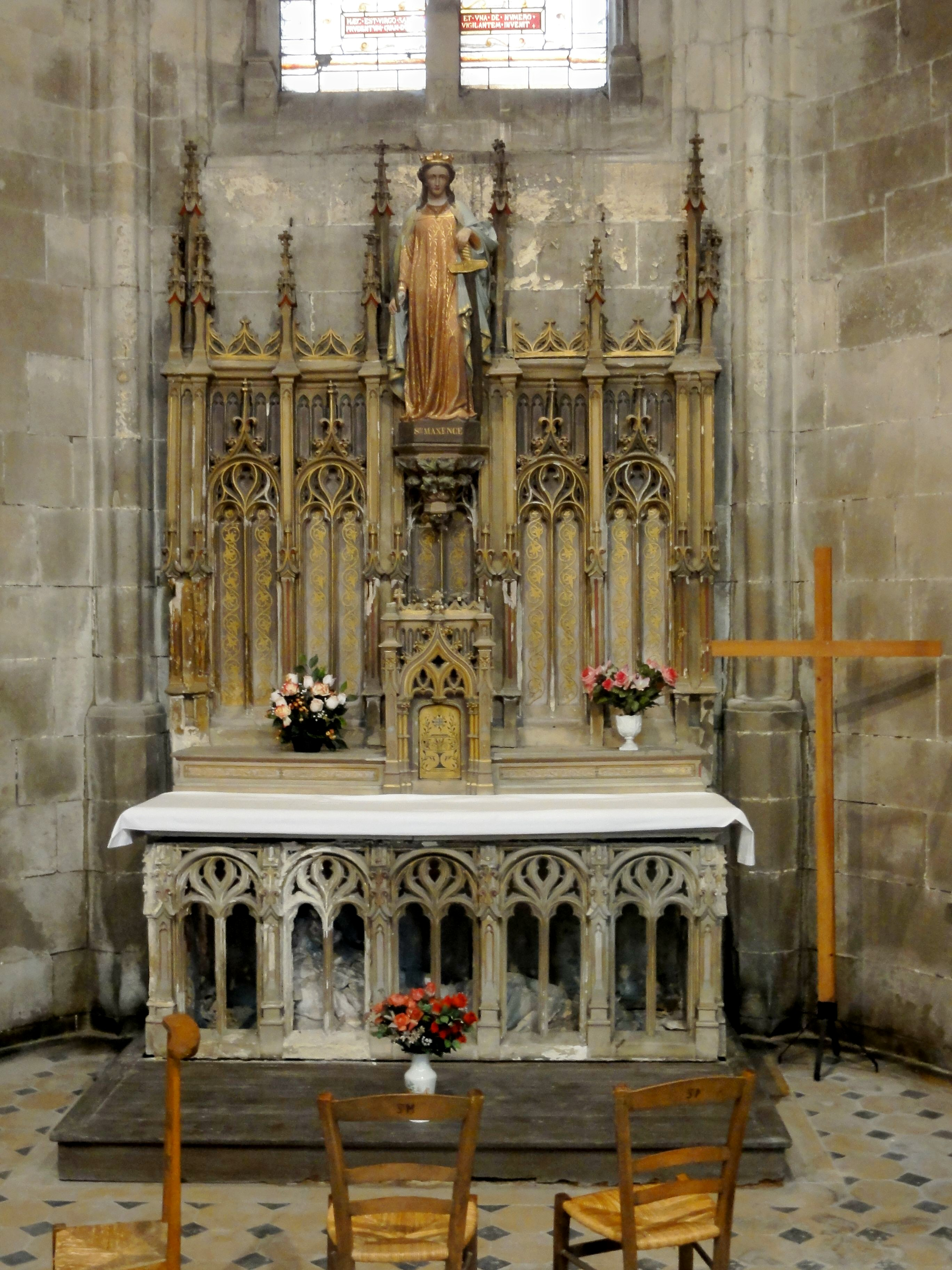 Déambulatoire, dernière chapelle rayonnante, autel de sainte Maxence, patronne de la paroisse et de la ville.